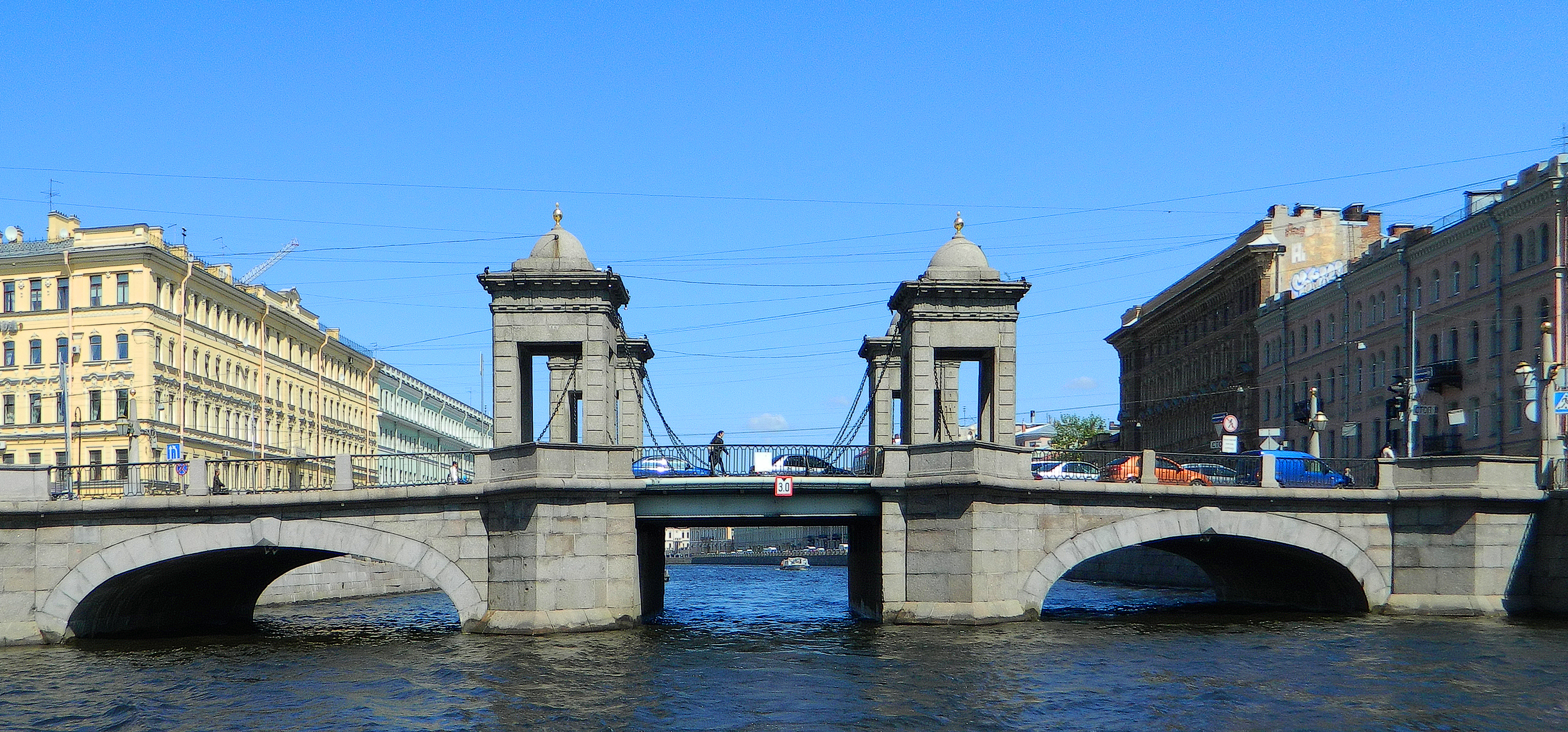 Мост Ломоносова (Чернышёв мост): через р. Фонтанку по улице Ломоносова, Центральный район, Санкт-Петербург